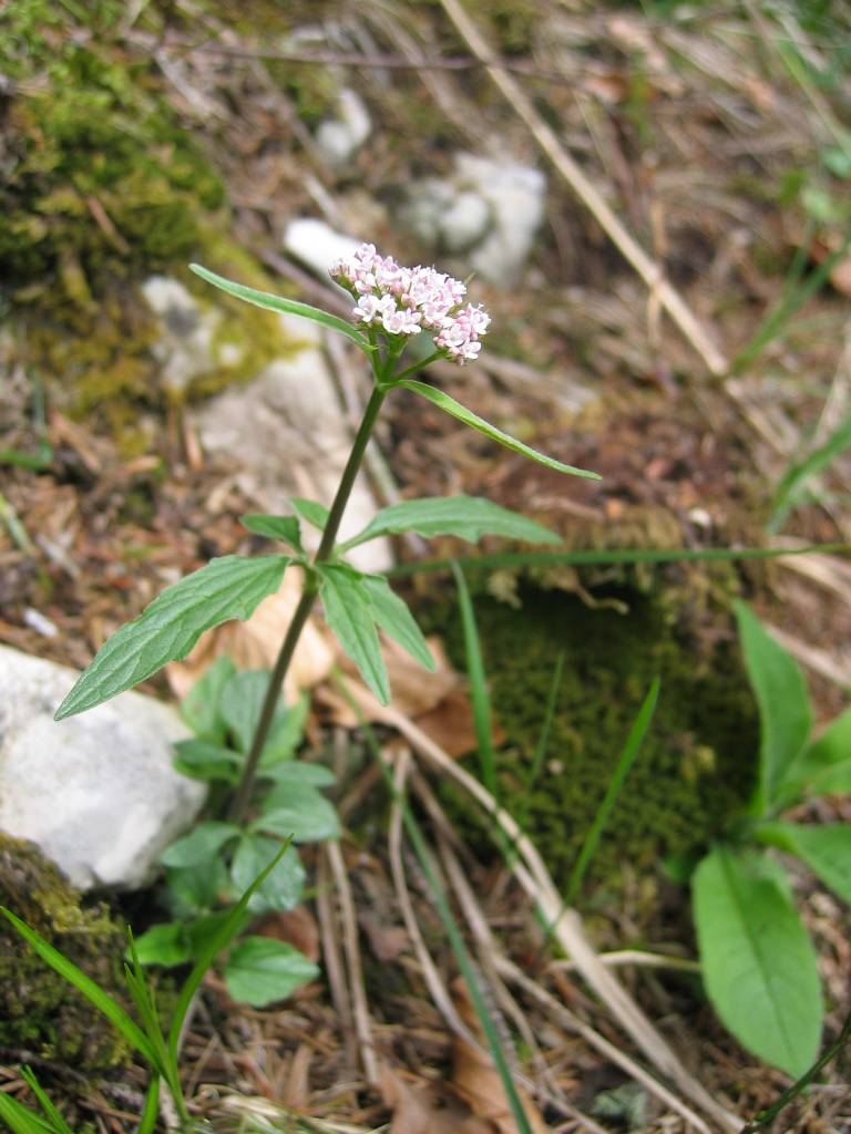 Description:Valeriana tripteris Habitat: Eibenberg, Upper Austria, Austria (~700 m)